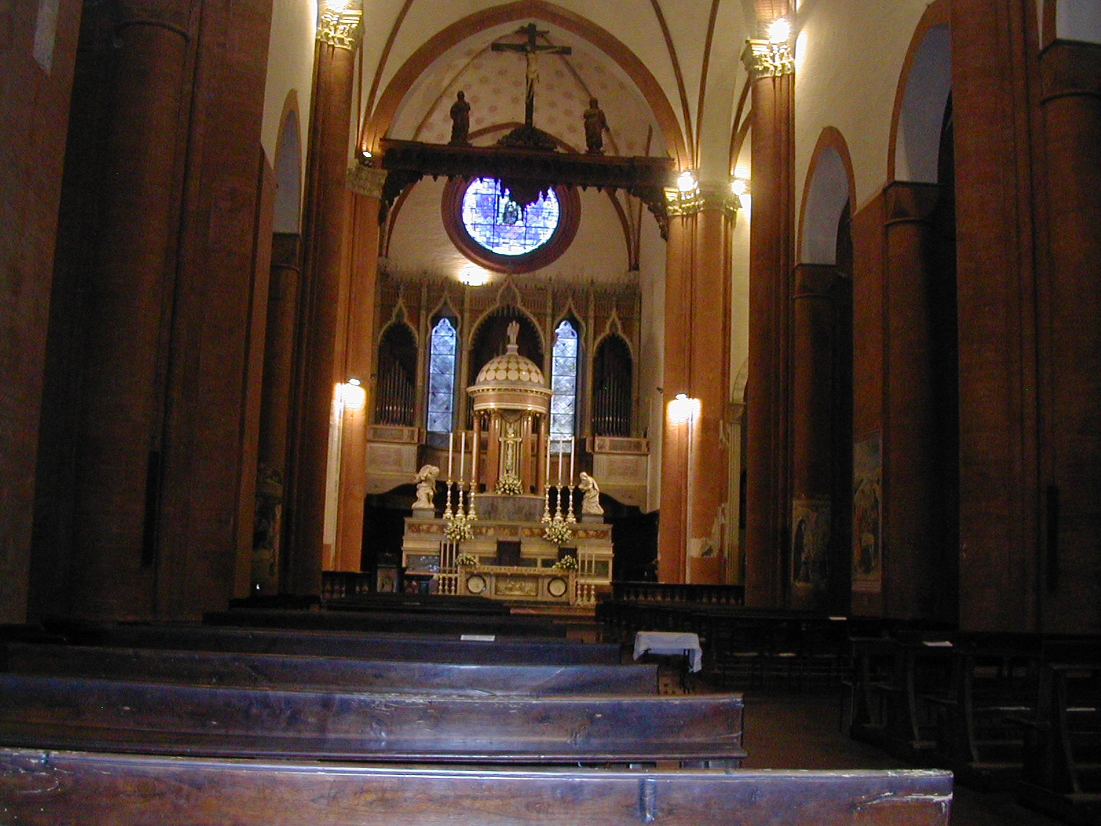 Chiesa Del Carmine Pavia